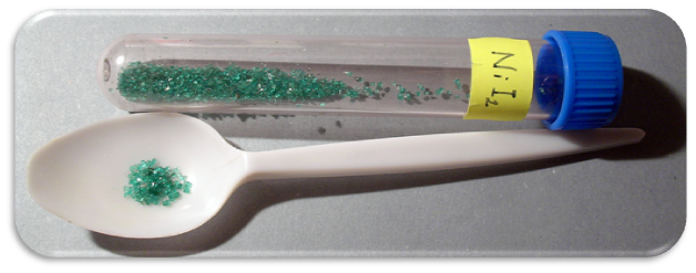 Jodid nikelnatý - NiI2